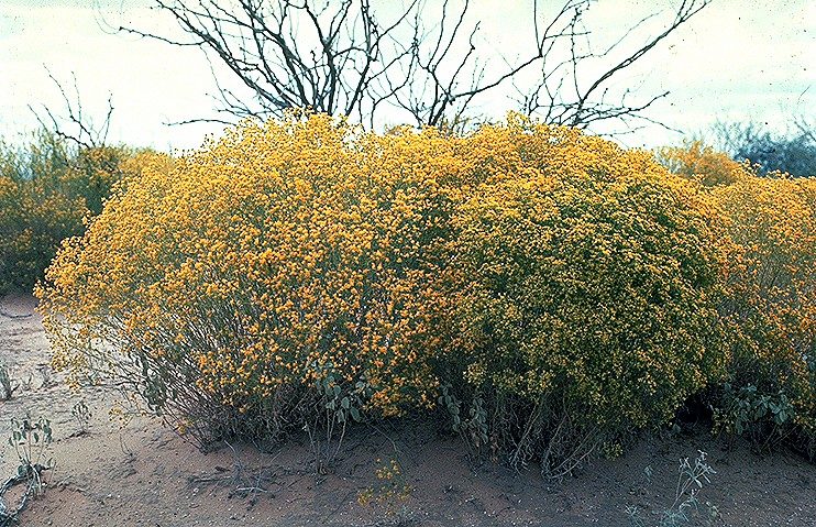 Gutierrezia sarothrae